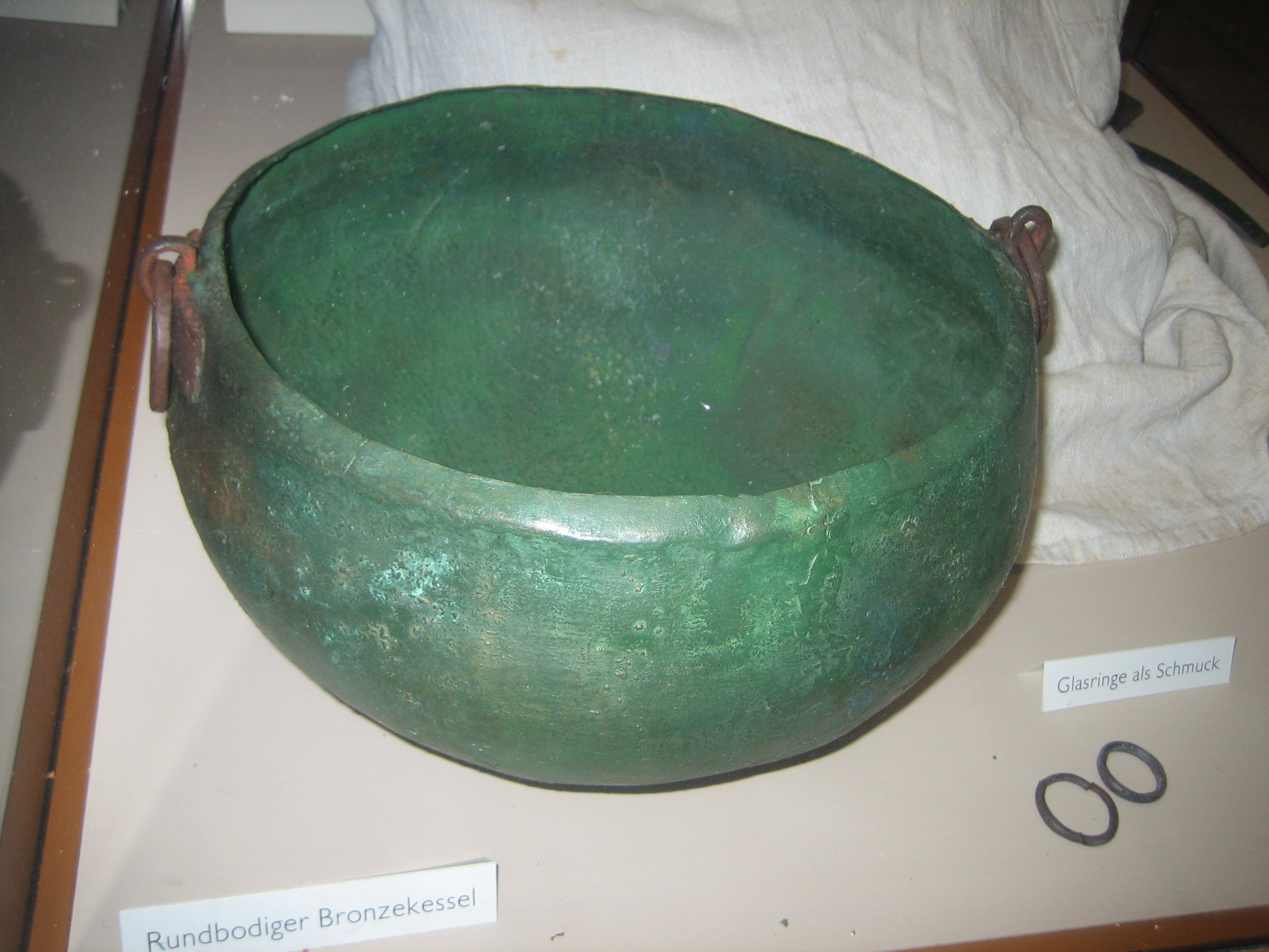 Bronzekessel aus den Keltengräbern im Zollikerberg; Kopie im Ortsmuseum Zollikon